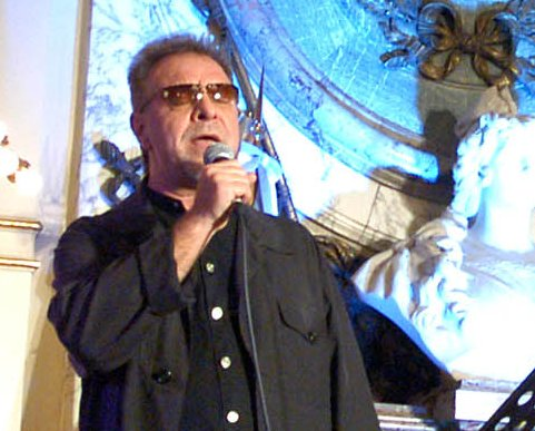 León Gieco. En la Casa Rosada. Buenos Aires. Argentina. 23 de septiembre de 2005. foto oficial